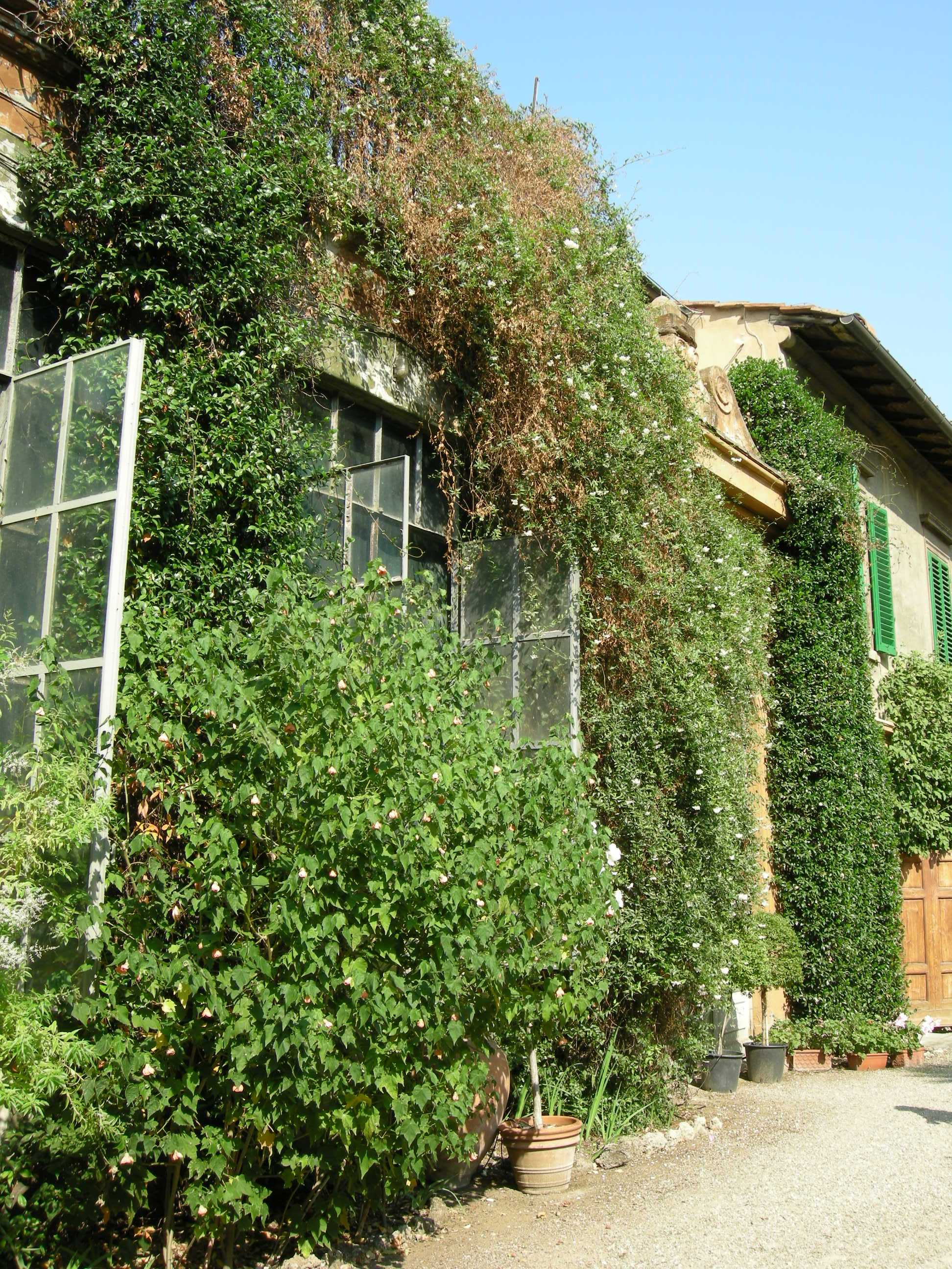 Palazzo budini gattai grifoni, giardino